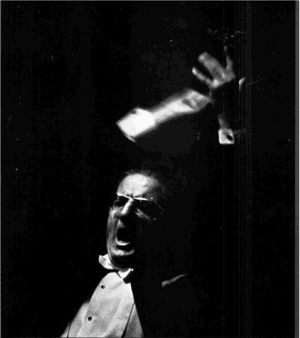 Foto del Direttore d'Orchestra Italiano M° INO SAVINI mentre dirige l'opera "NABUCCO" di G. Verdi allo Stad Theater di Belfast (Irlanda del Nord) il 23 maggio 1967.